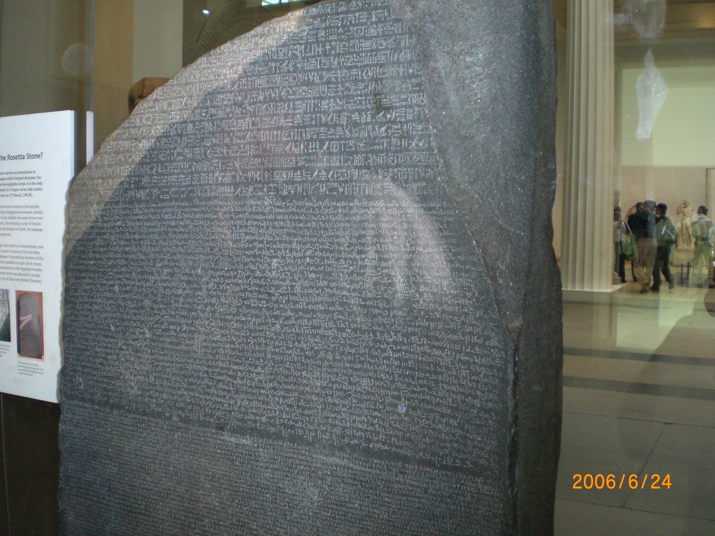 Rosseta Stone